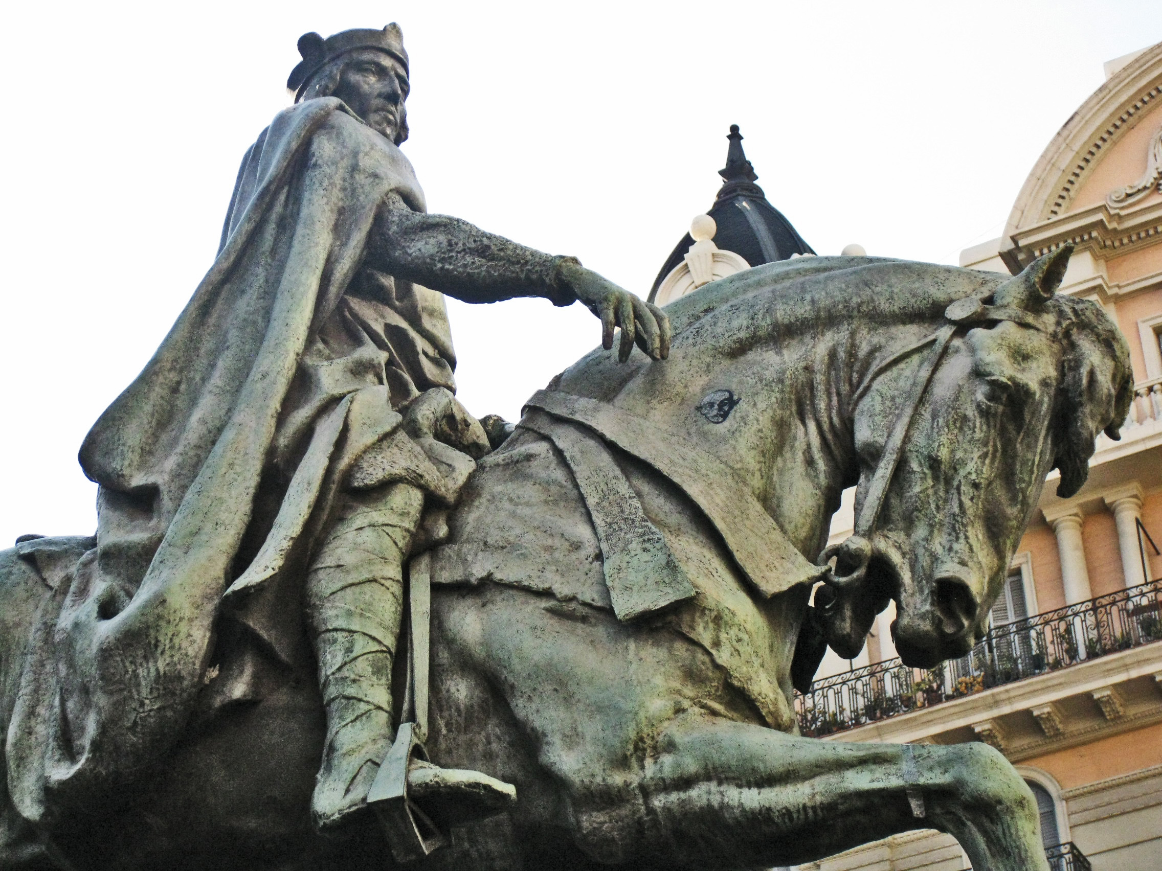 Monument eqüestre a Ramon Berenguer III, el Gran, situat a la plaça homònima, vora la Via Laietana de Barcelona. Es tracta d'una estàtua de bronze realitzada a partir d'un model de guix de Josep Llimona del 1888.